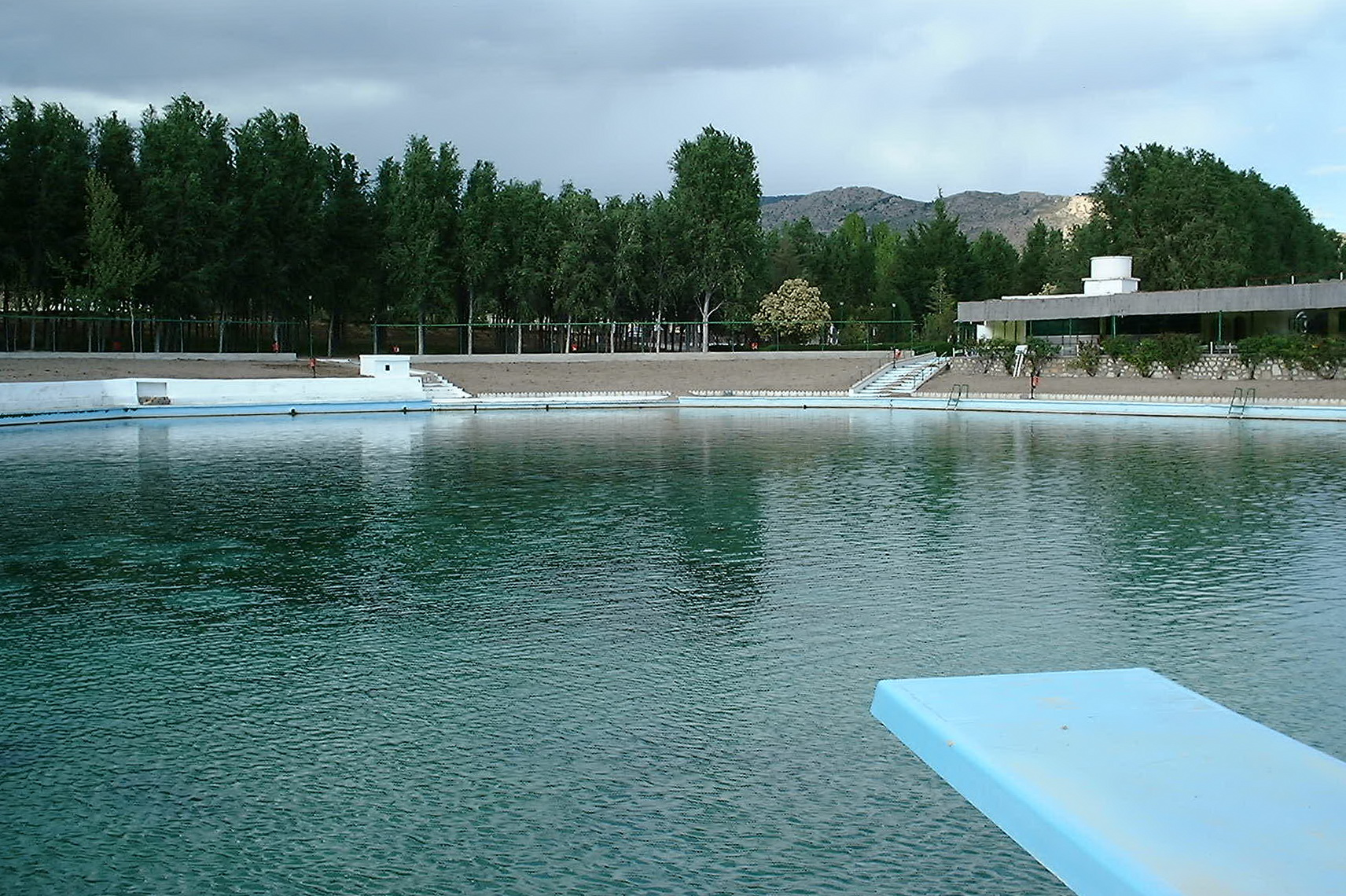 Manantial de Fuencaliente en el año 2001